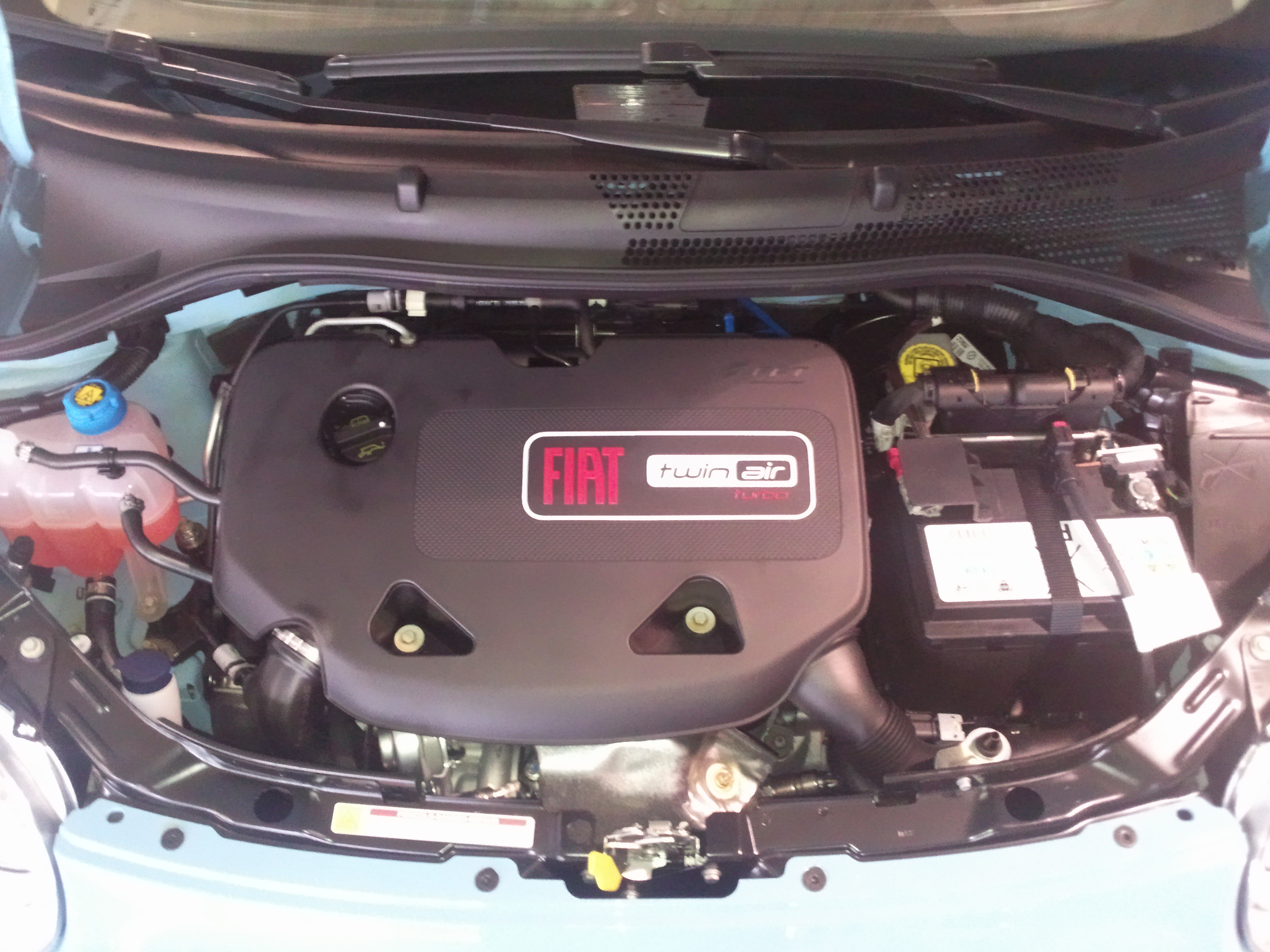 Fiat 500 Motor TwinAir 875 ccm 85 PS